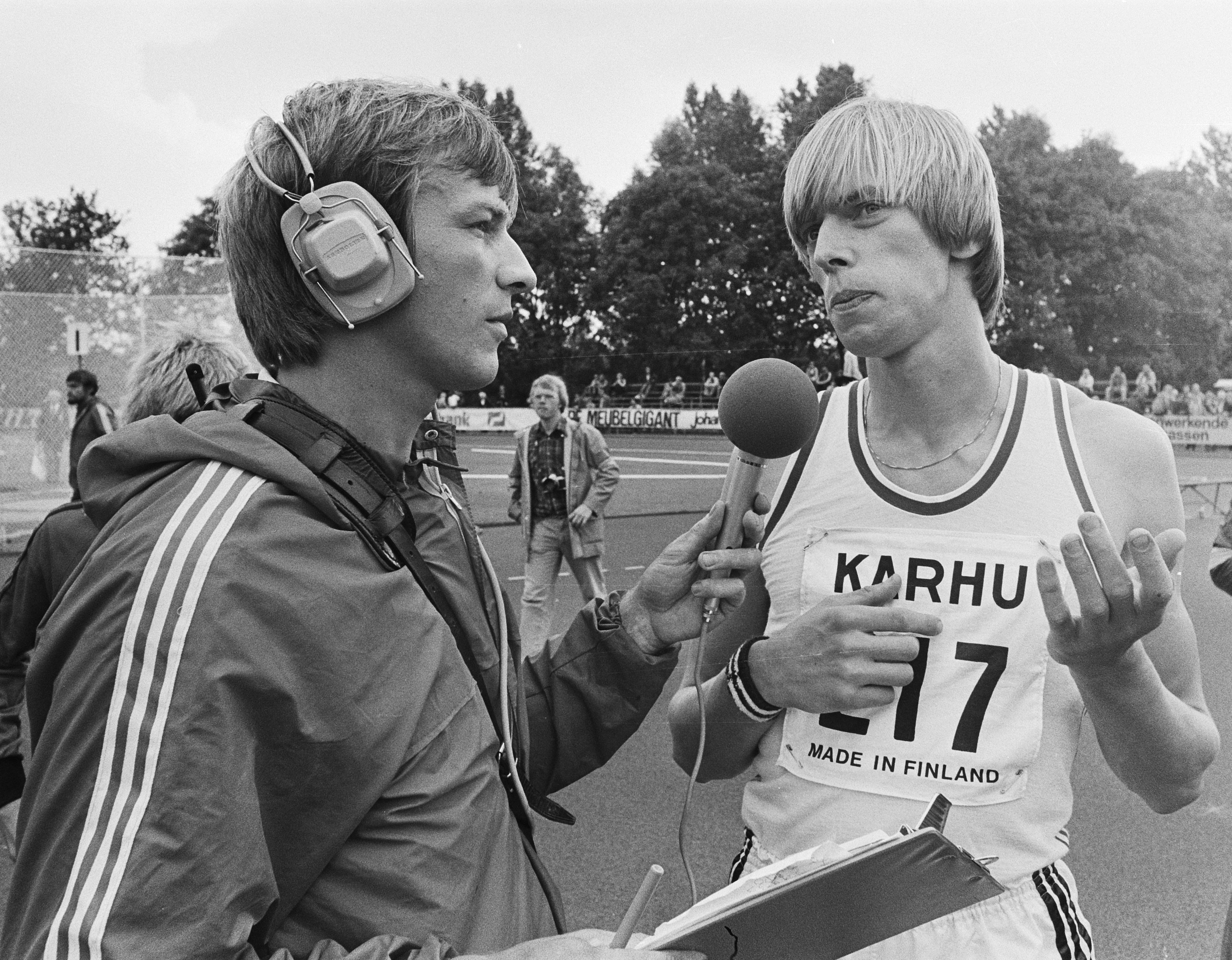 Nationale atletiekkampioenschappen Groningen; Eltjo Schutter interviewt Wielart